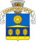 Герб города Солнечногорска